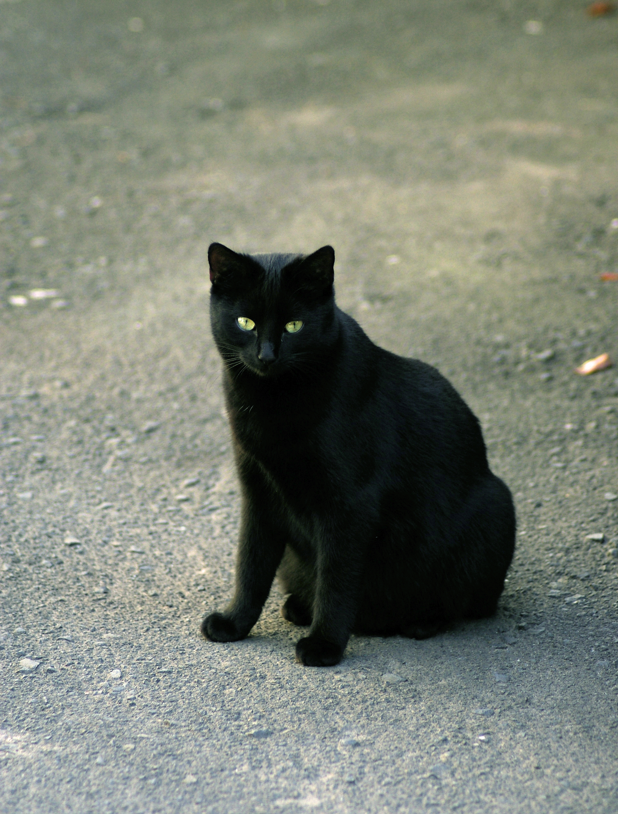 Schwarze Katze